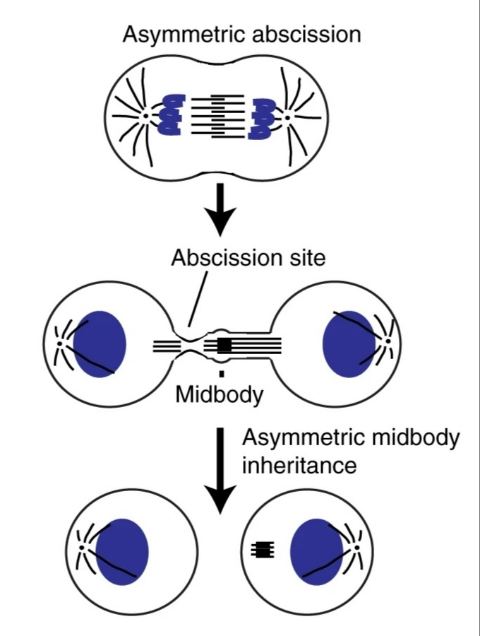 Figura 1_ El cuerpo de Flemming, posterior a la abscisión. Abscisión celular asimétrica. El cuerpo de Flemming se "hereda" en una de las células interfásicas.